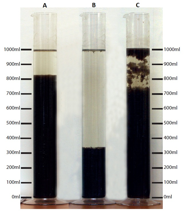 Proovid A ja B näitavad, et aktiivmuda on hea, aga A korral on vaja mudatagastust vähendada ja osa mudast kõrvaldada; C puhul on tegemist pundunud mudaga.